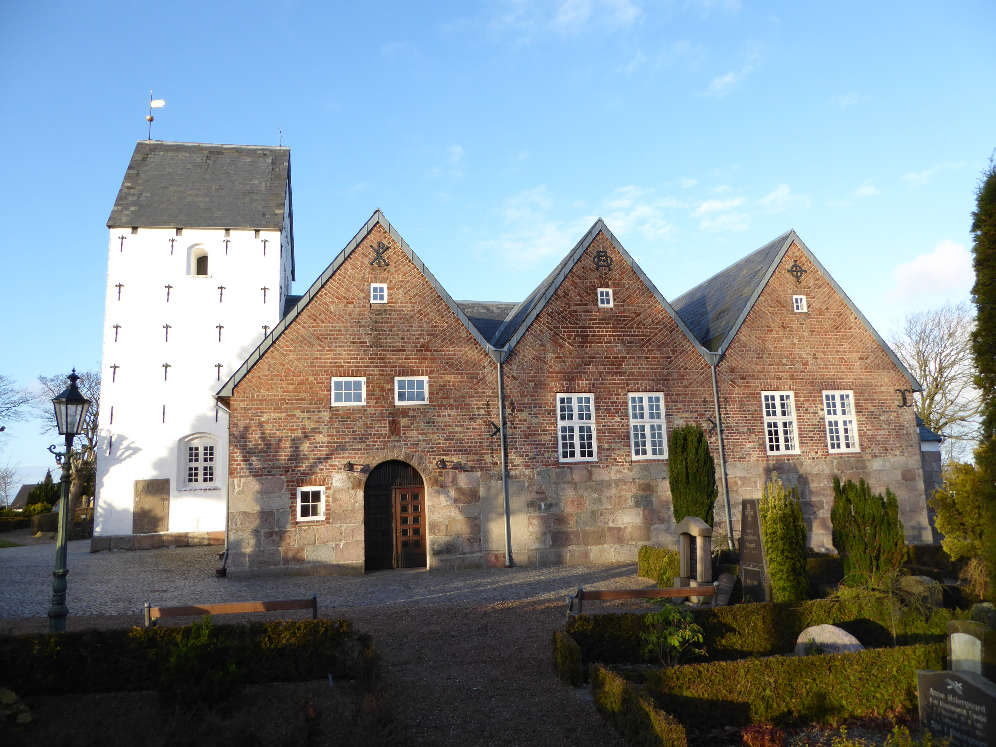 Toftlund kirke fra syd